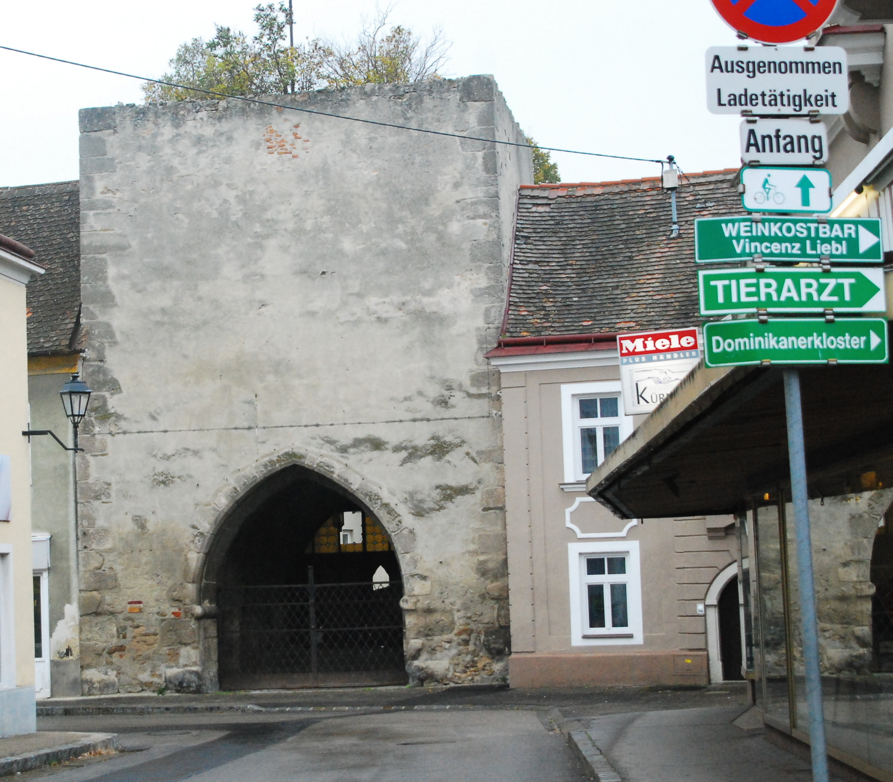 Der Nalberturm mit einem der Stadttore der Stadt Retz in Niederösterreich.